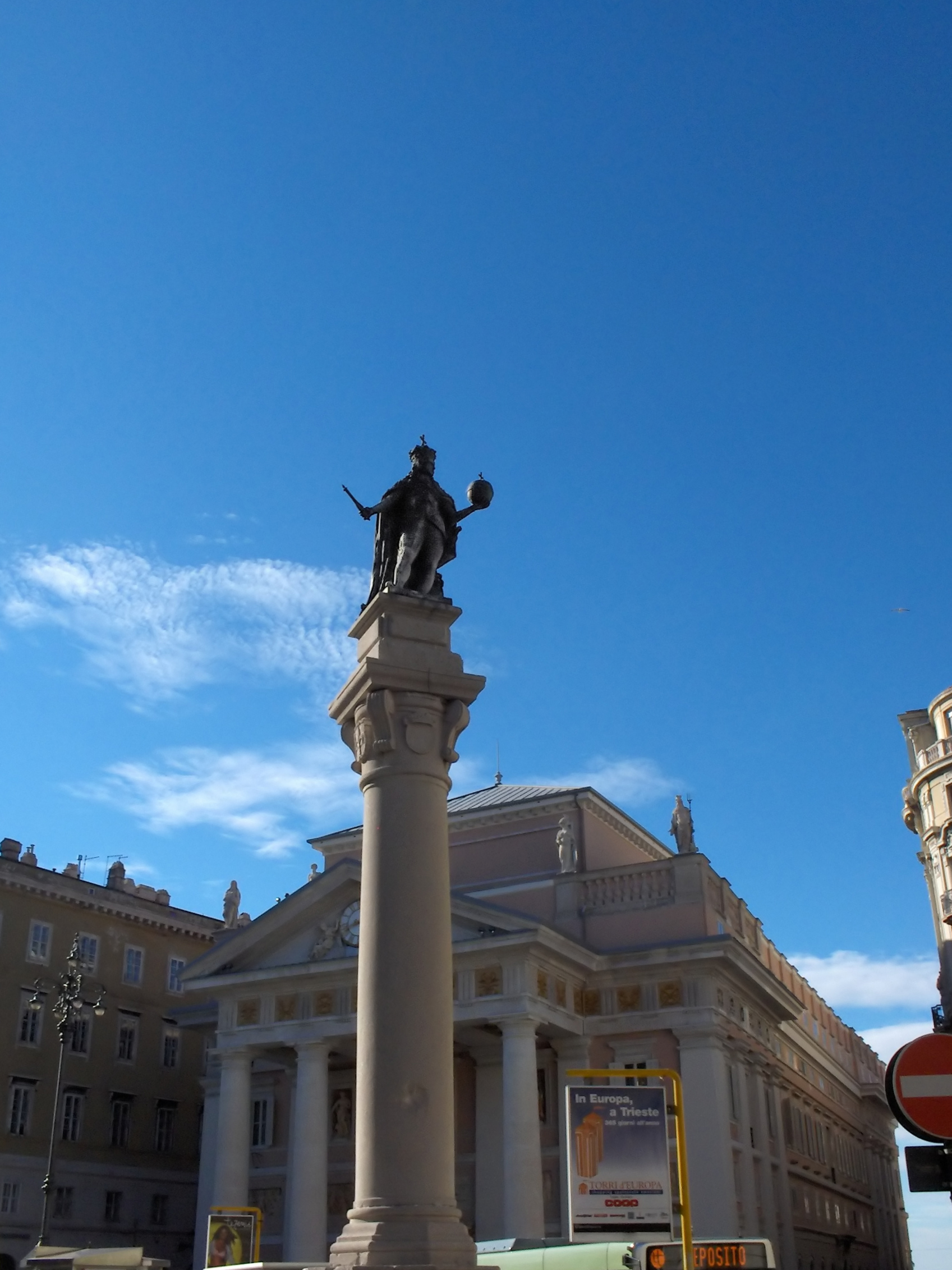 Trieste, Piazza della Borsa, Leopold I, Holy Roman Emperor column (1673)